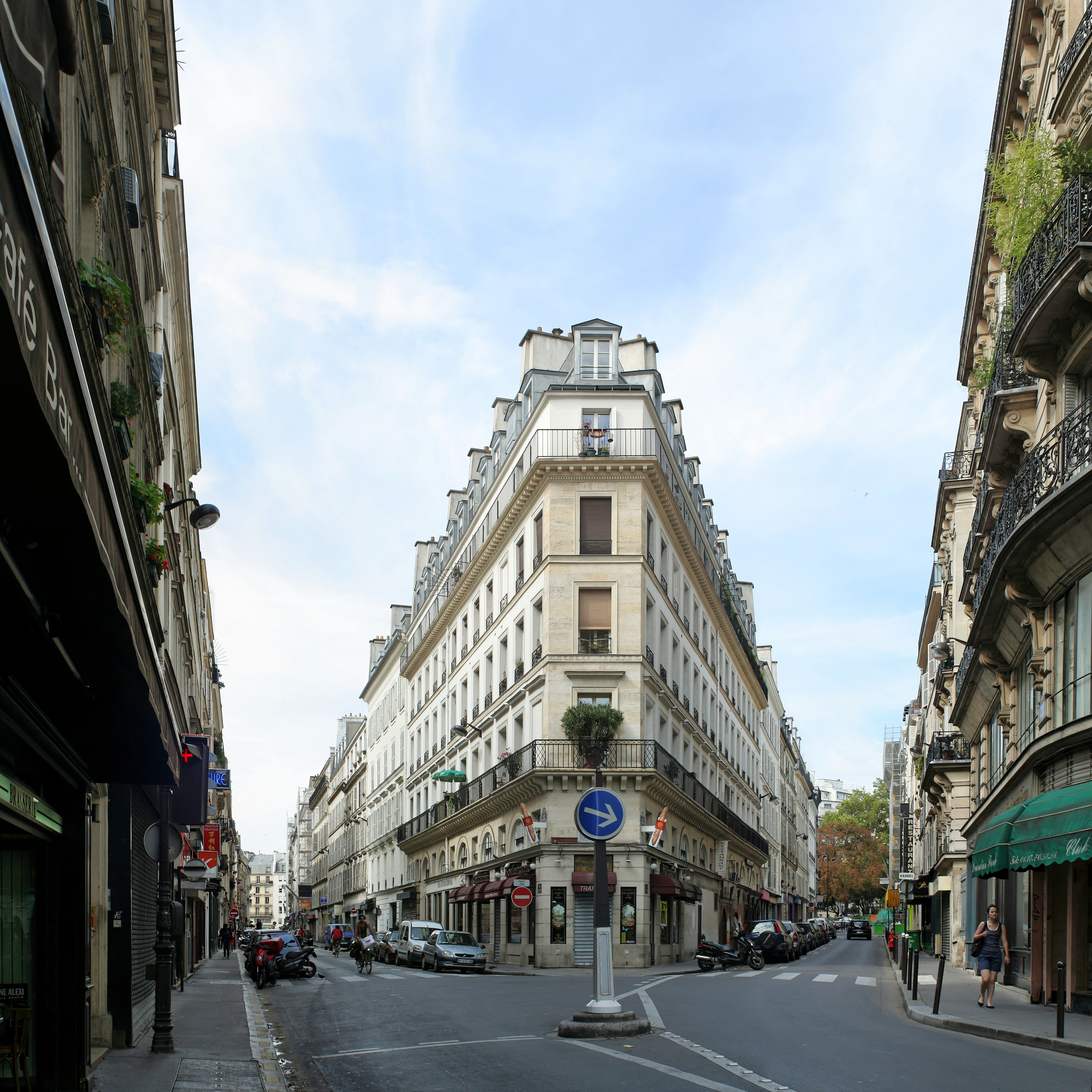 Paris, carrefour rue Bleue (à gauche) et rue Papillon (à droite, avec le square Montholon au fond). Immeuble d'angle (2 rue Bleue et 1 rue Papillon) néo-classique à pan coupé.